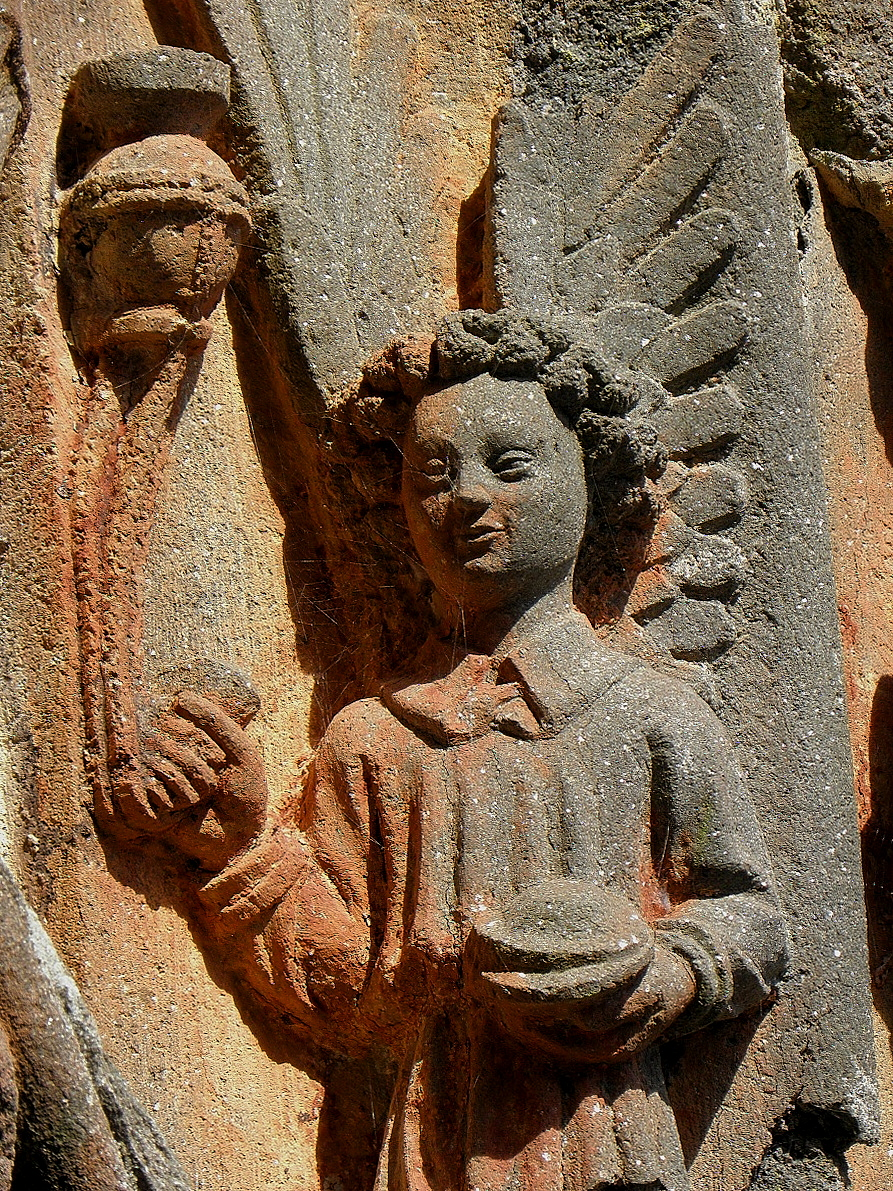 Porche sud de l'église Saint-Salomon de La Martyre (29).